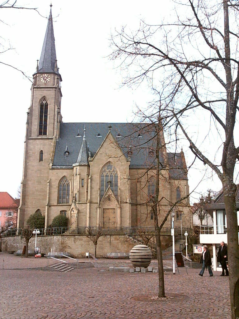 Evangelische Kirche im Ortskern von Bad Rappenau, selbst fotografiert, März 2006